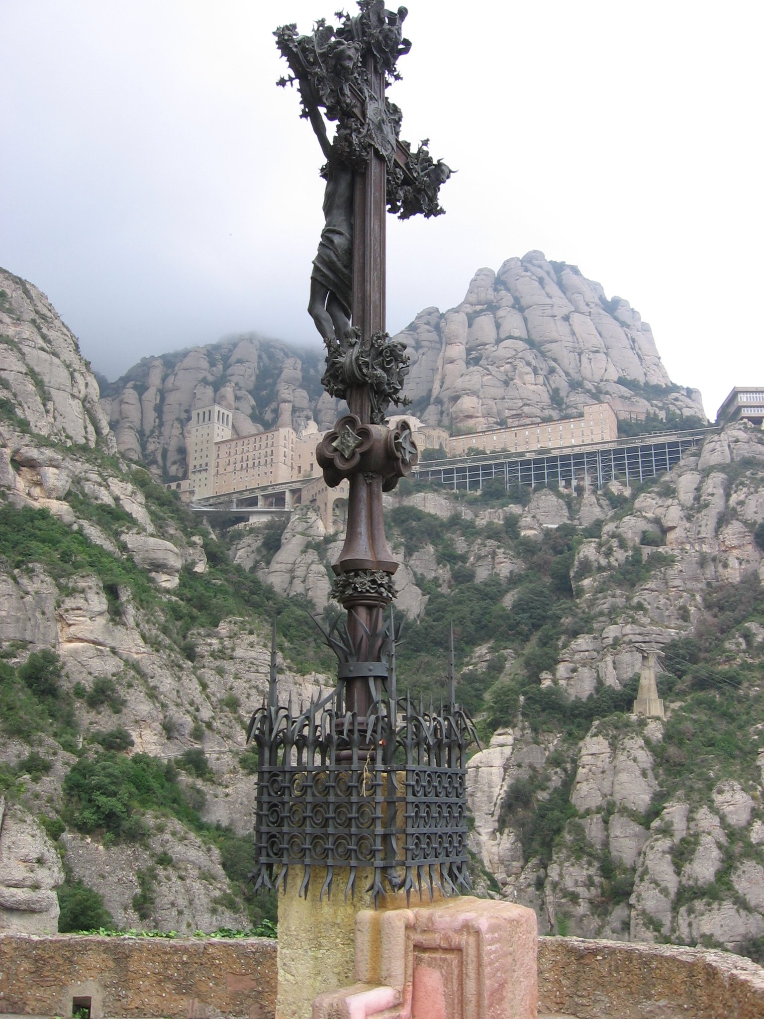 V Misteri de Dolor del Via Crucis de Montserrat. Camí de la Santa Cova (Montserrat, Barcelona). Disseny de Puig i Cadafalch, escultura de Josep Llimona i enreixat de forja de Manuel Ballarin